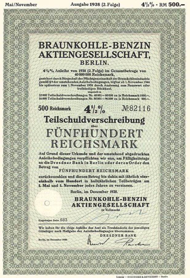 BRABAG-Teilschuldverschreibung